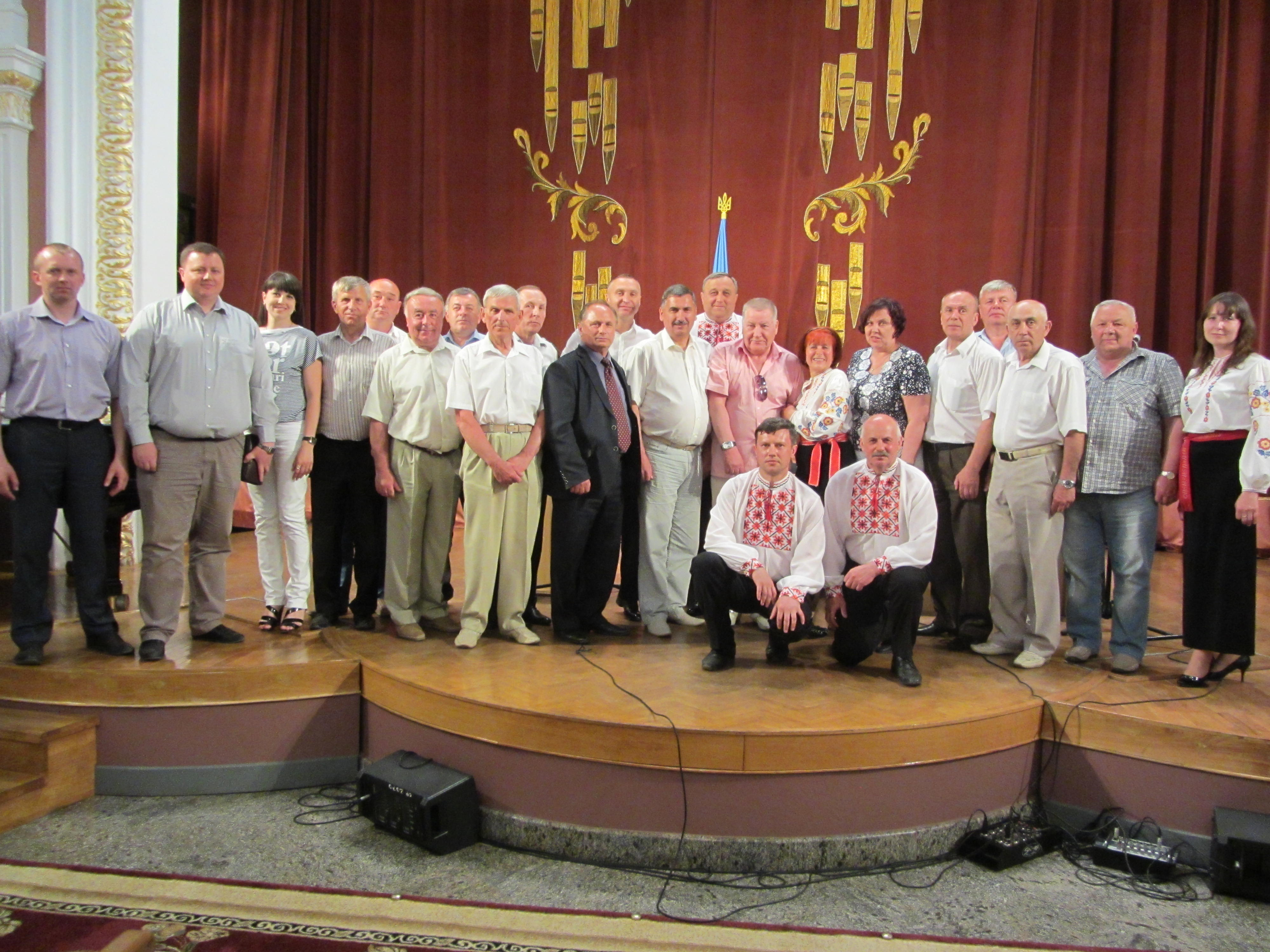 Збори Недригайлівського земляцтва в Сумах присвячені Коровинській громаді (29.05.2015)